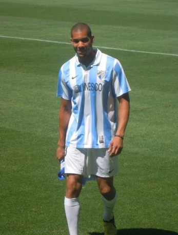 Onyewu en su presentacion con el Malaga C.F.